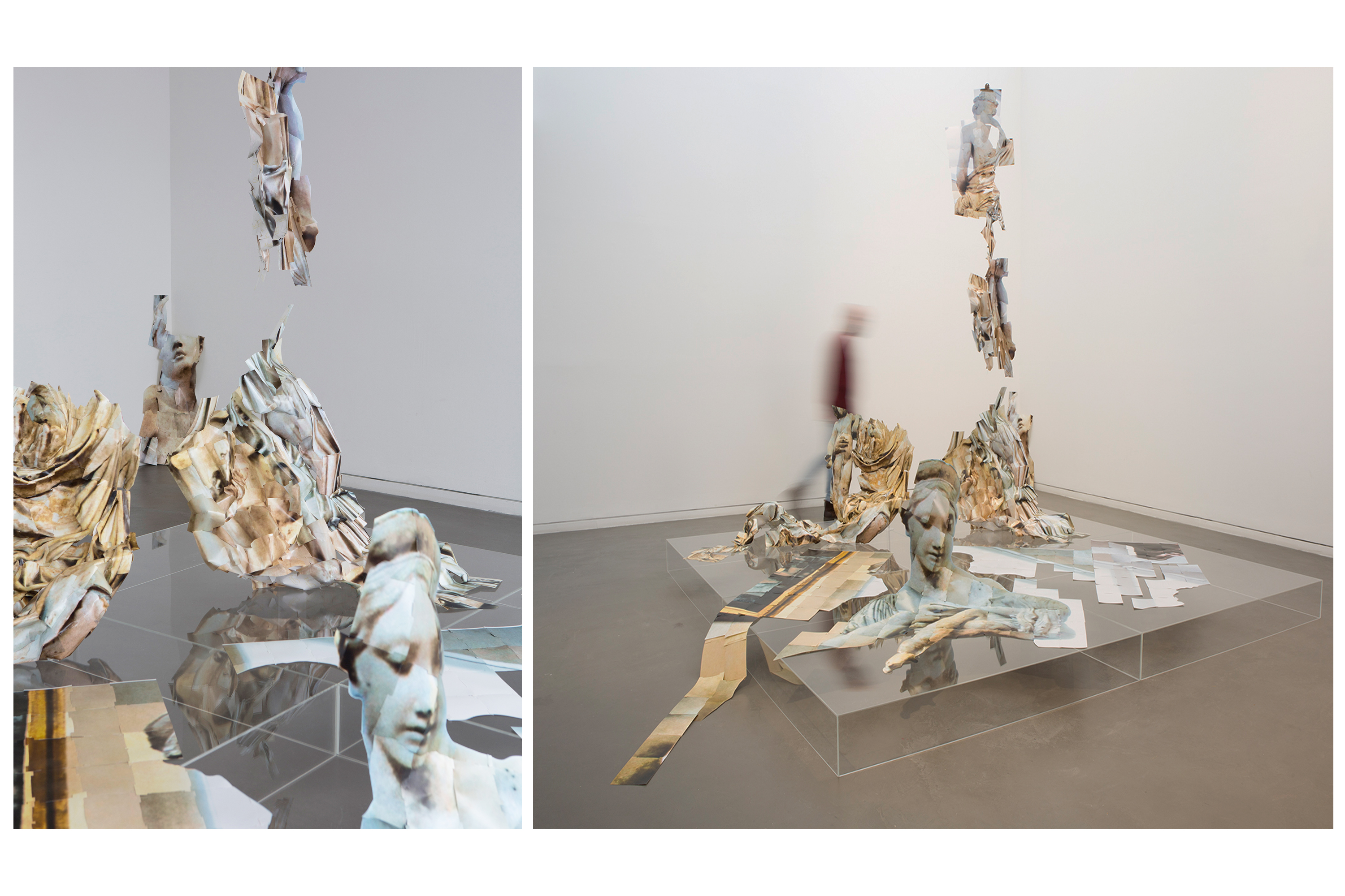 מיצב צילומי, מראה הצבה, 2017-2018 צילומים שזורים על במת פרספקס 3x3 מטר. הוצג בתערוכת היחיד לנוכח פסל, באוצרות שלומית ברויר גלריה בסיס, בסיס לאמנות ותרבות, הרצליה תיעוד: לנה גומון